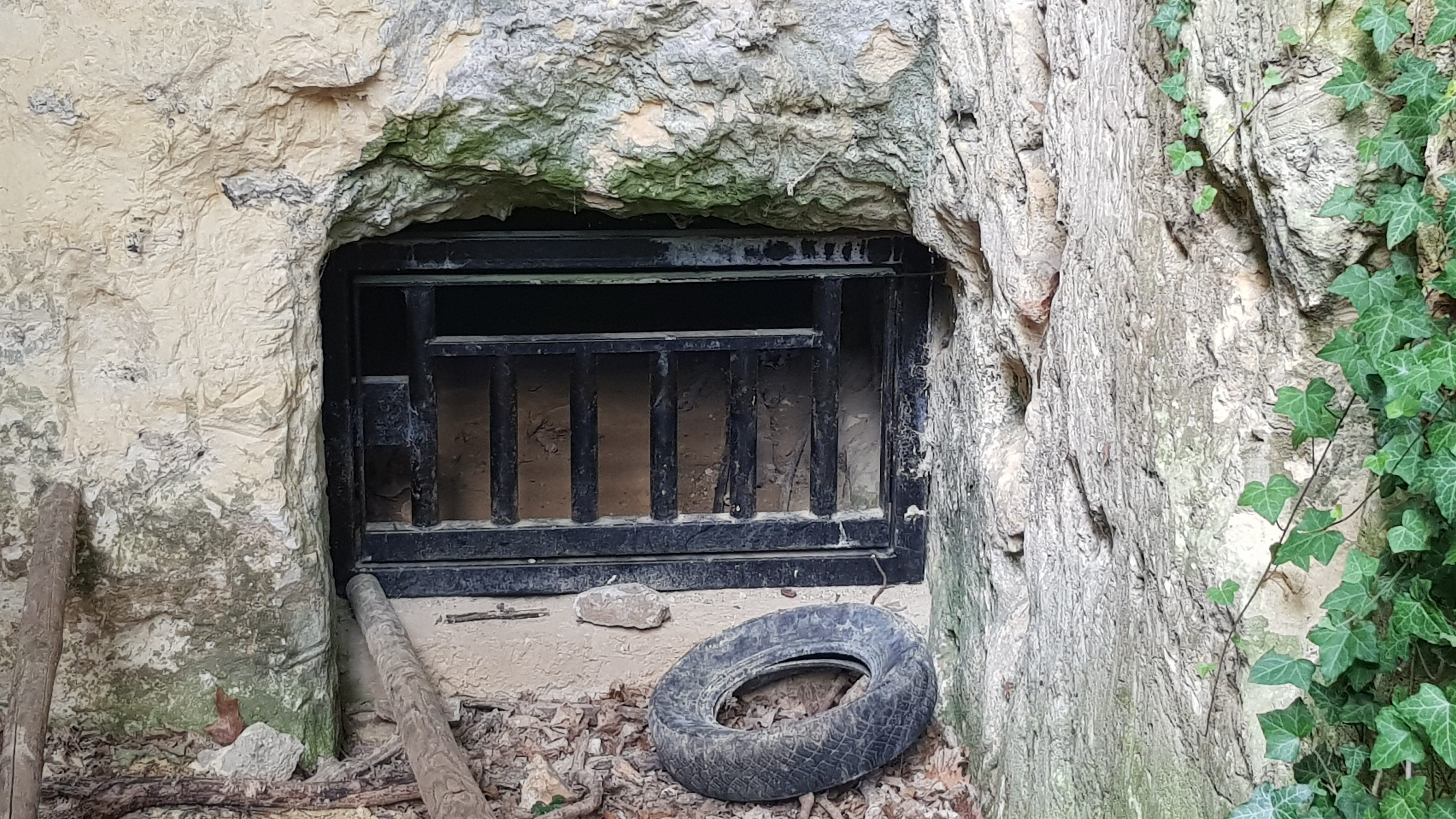 Groeve Groot Welsden, Groot Welsden, Nederland